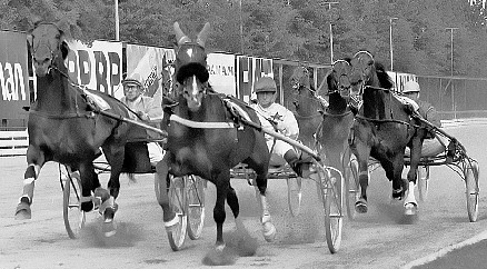 "Eileen Eden" leder Elitloppets final 1968 när 600 meter återstår, före blivande tvåan Seigneur och innerspårets Jane Will. Foto: Erik Widén, .